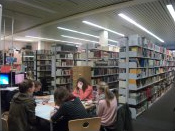 Die Bibliothek